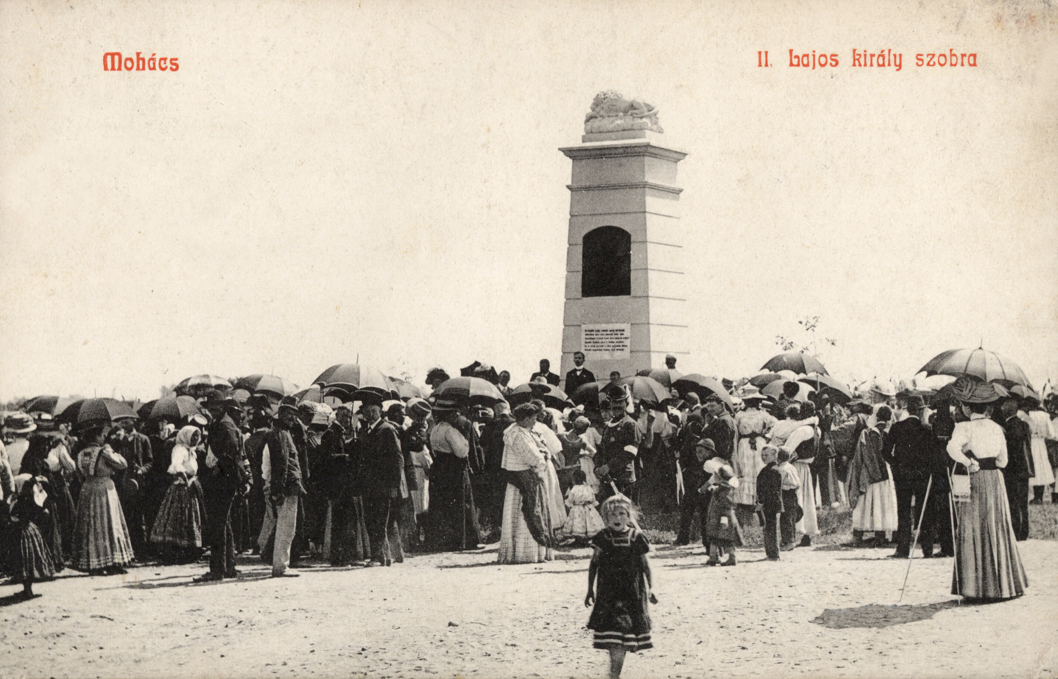 Mohácsi II. Lajos-emlékmű régi képeslapon